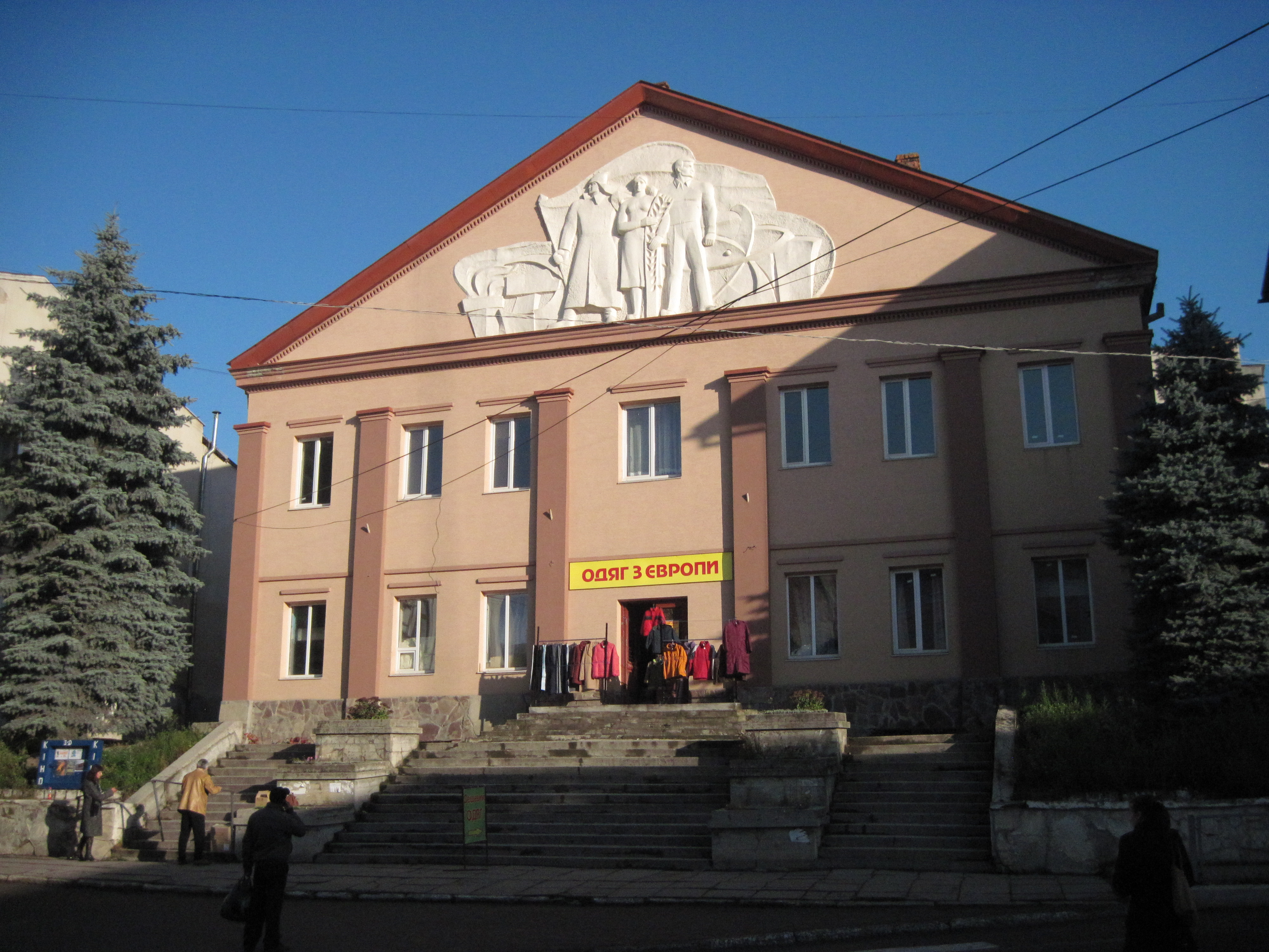 Кінотеатр. Бучач, осінь 2013